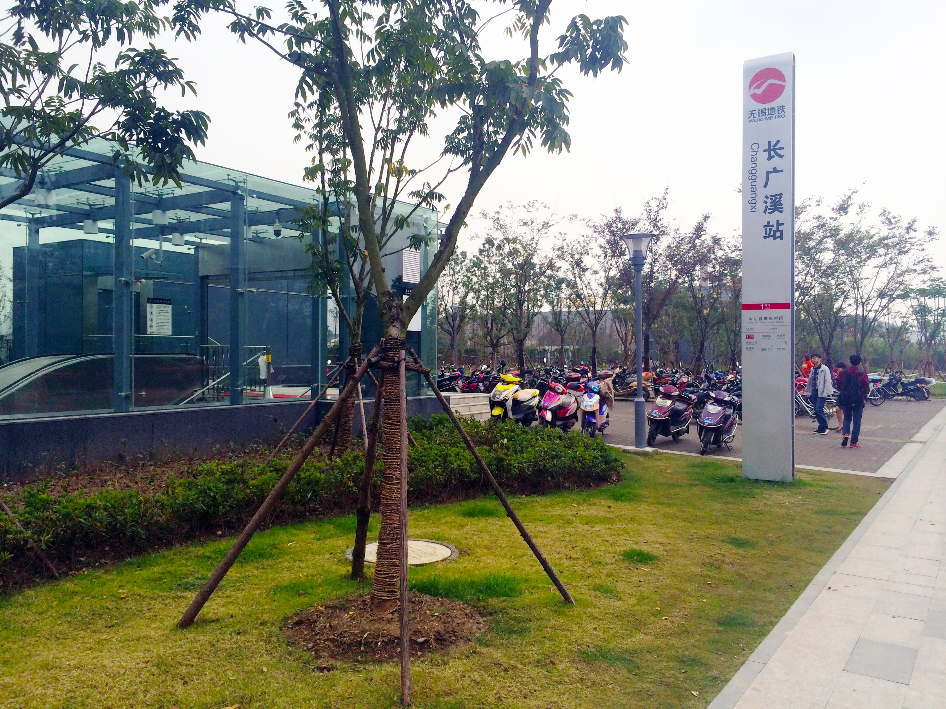 無錫地鐵長廣溪站4號口